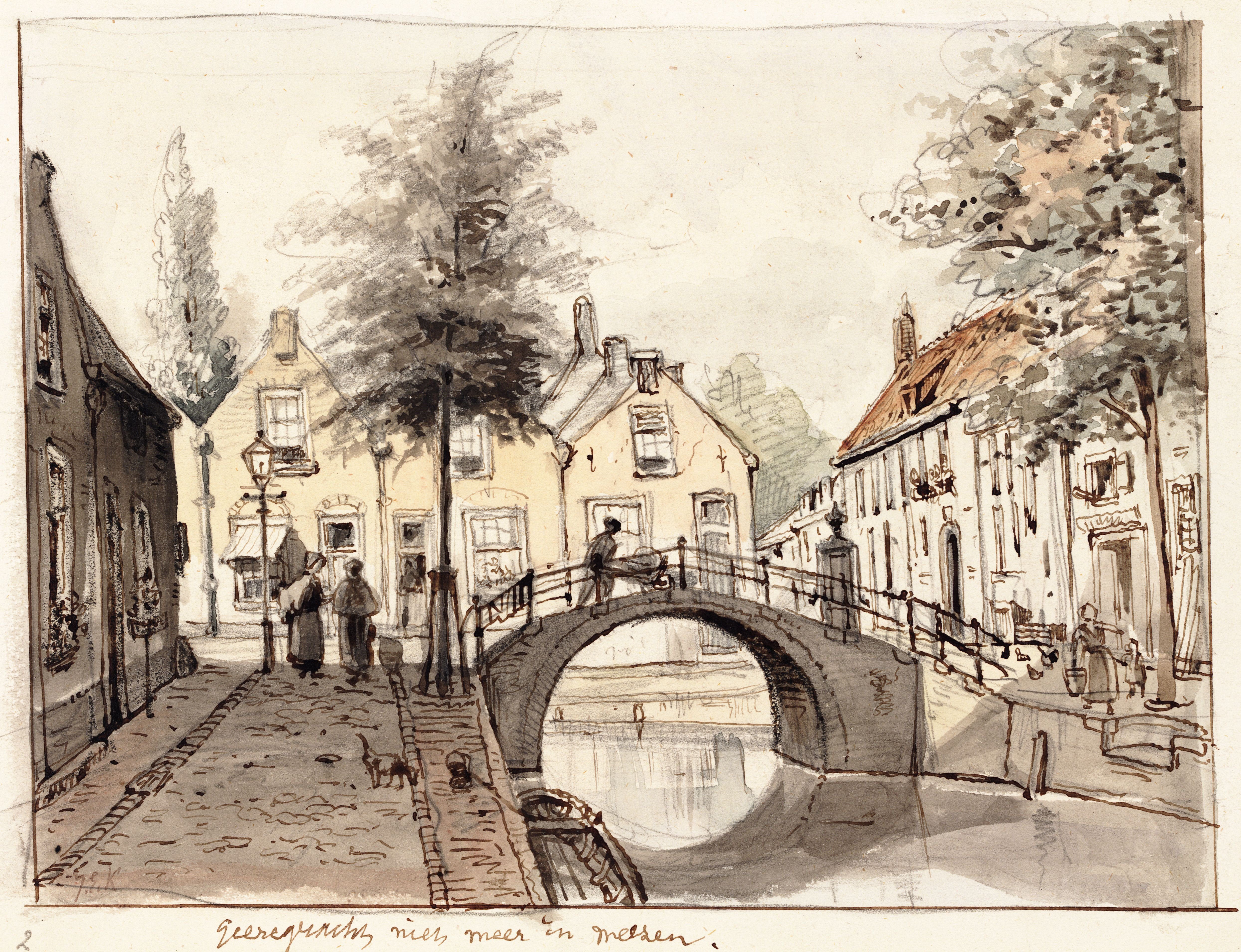 Tekening van Jan Elias Kikkert van de Geregracht in Leiden.